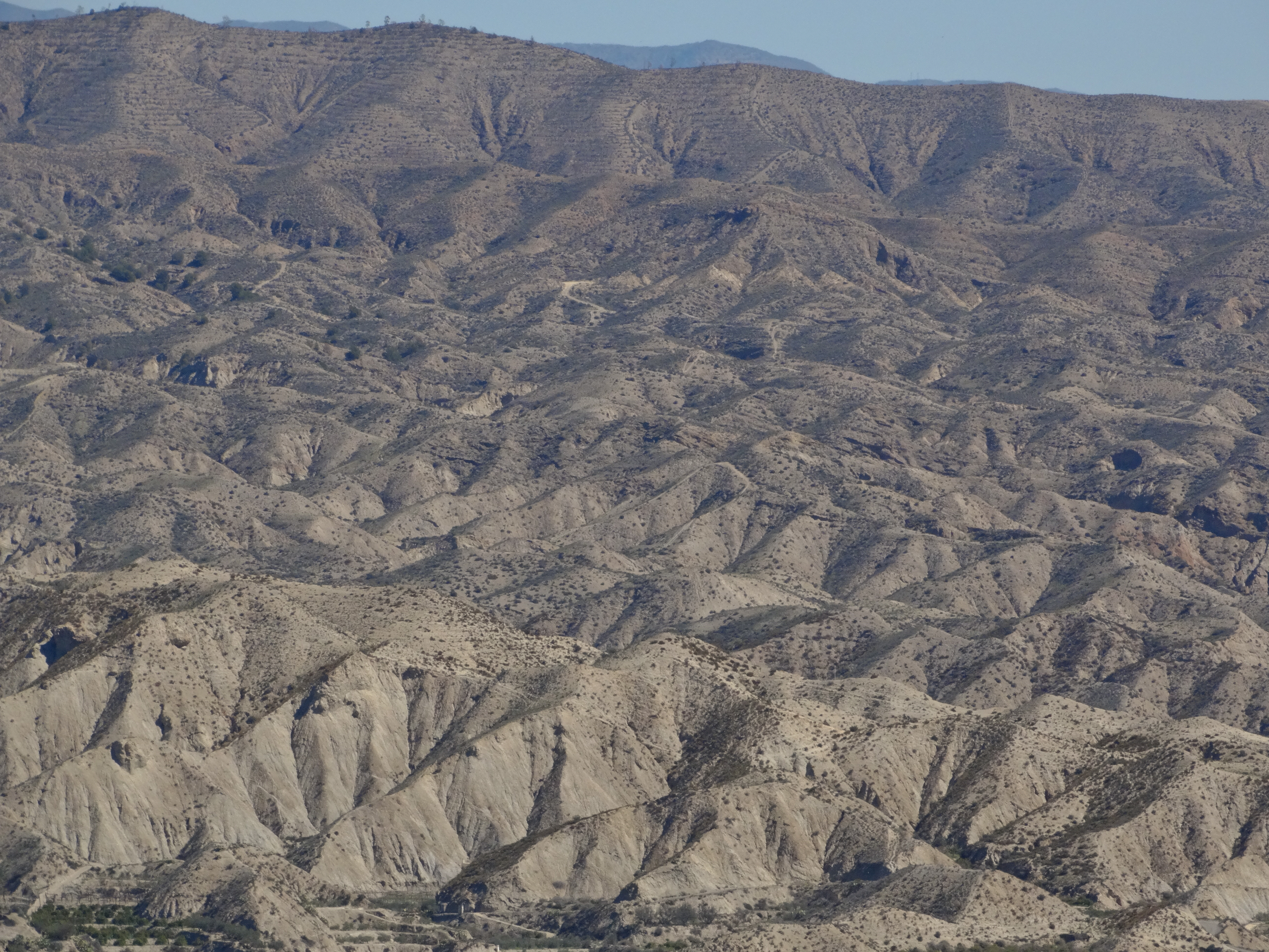 Vista desde el sur a las montañas desérticas en las zonas de protección Ramblas de Gergal, Tabernas y Sur de Sierra Alhamilla y Paraje natural del Desierto de Tabernas This is a photography of a Special Area of Conservation in Spain with the ID: ES6110006. Natura2000 entry, EEA entry